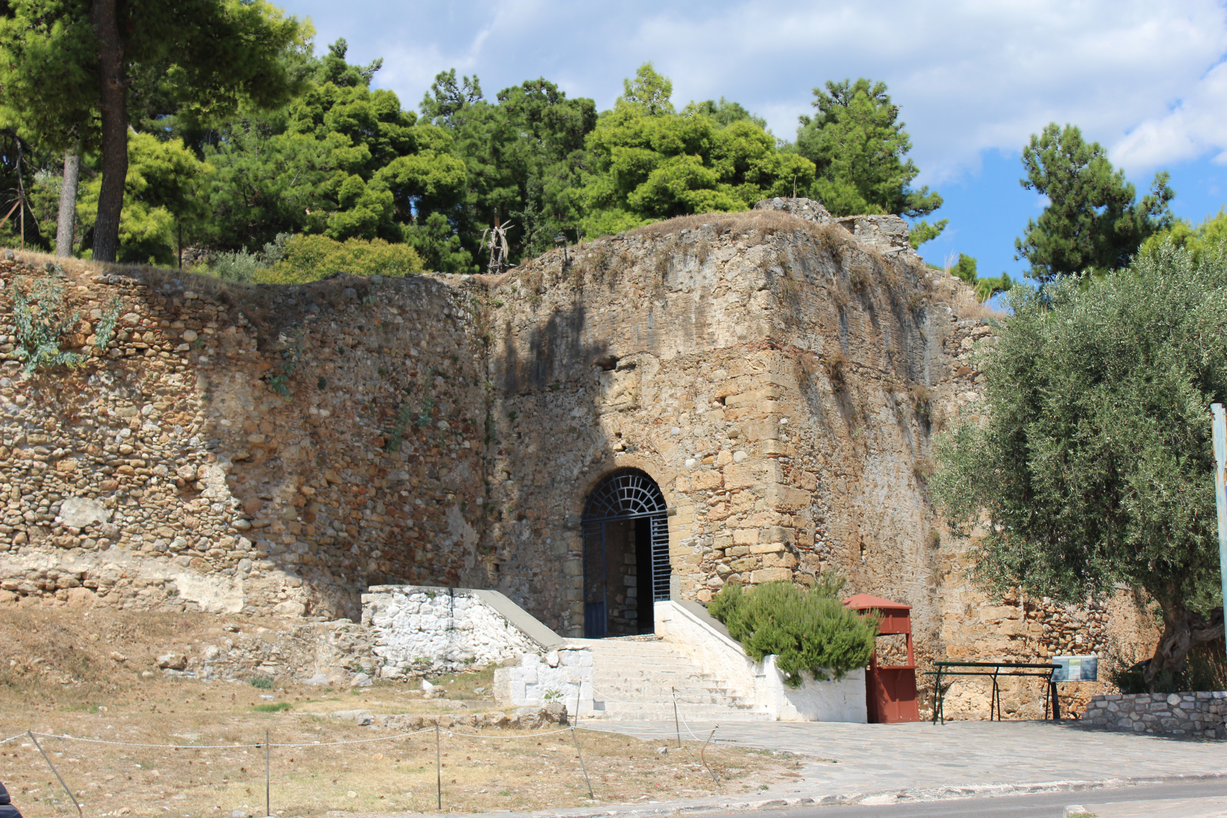 Κάστρο Καλαμάτας«Κάστρο Καλαμάτας»